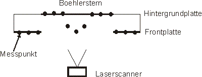 Boehlerstern-schema